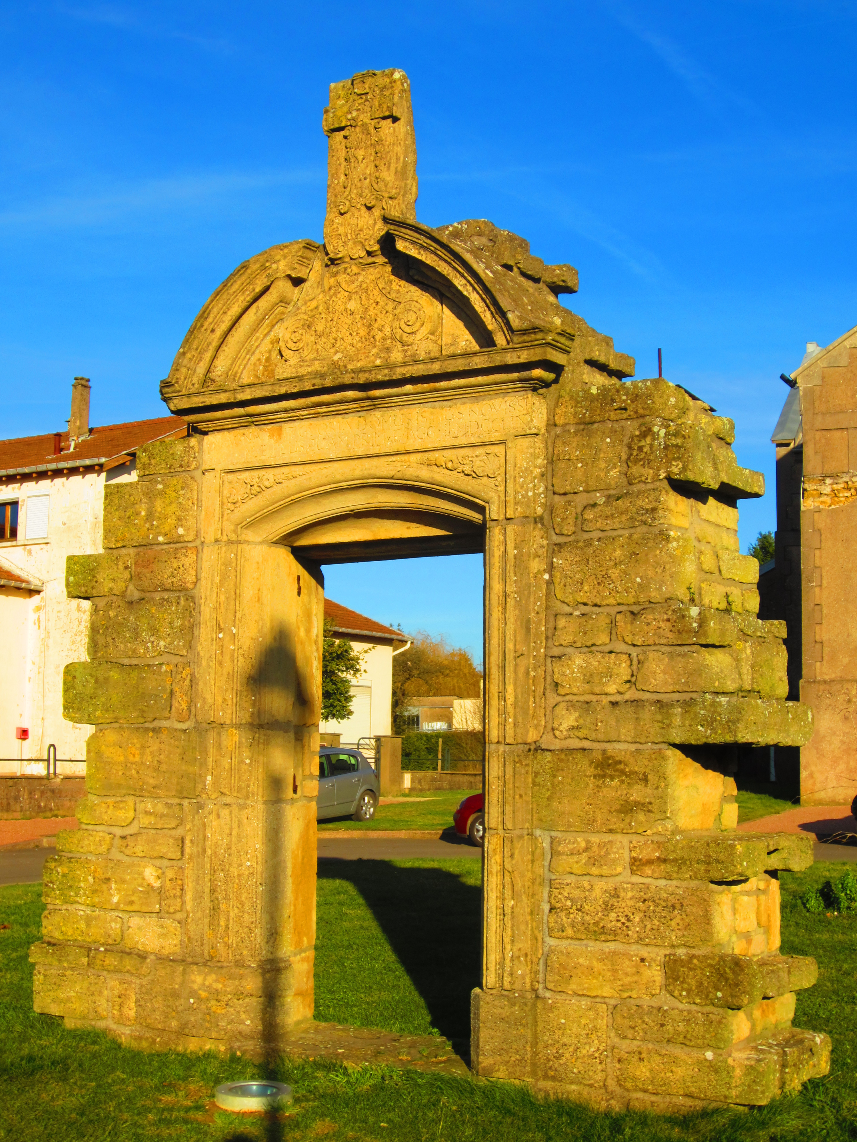 Piennes Porche eglise